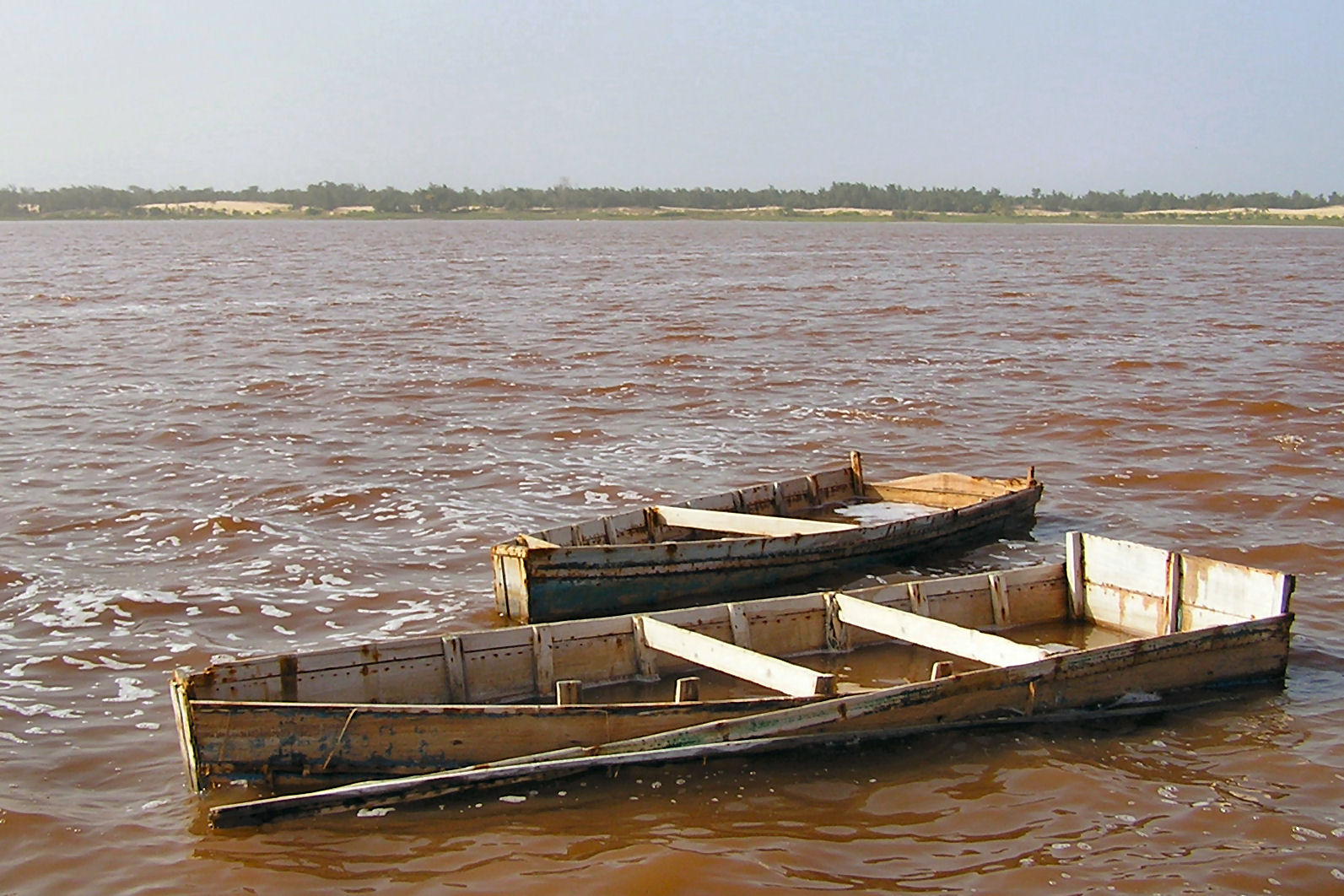 Barque permettant de récolter le sel au lac rose (Sénégal)